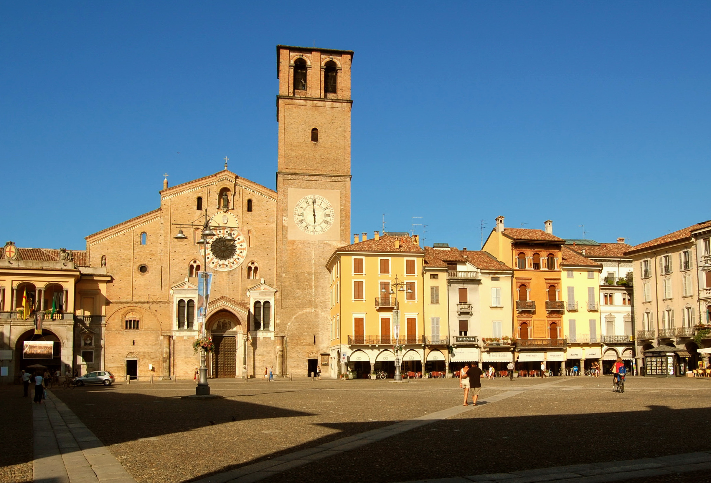 Piazza della Vittoria, Lodi